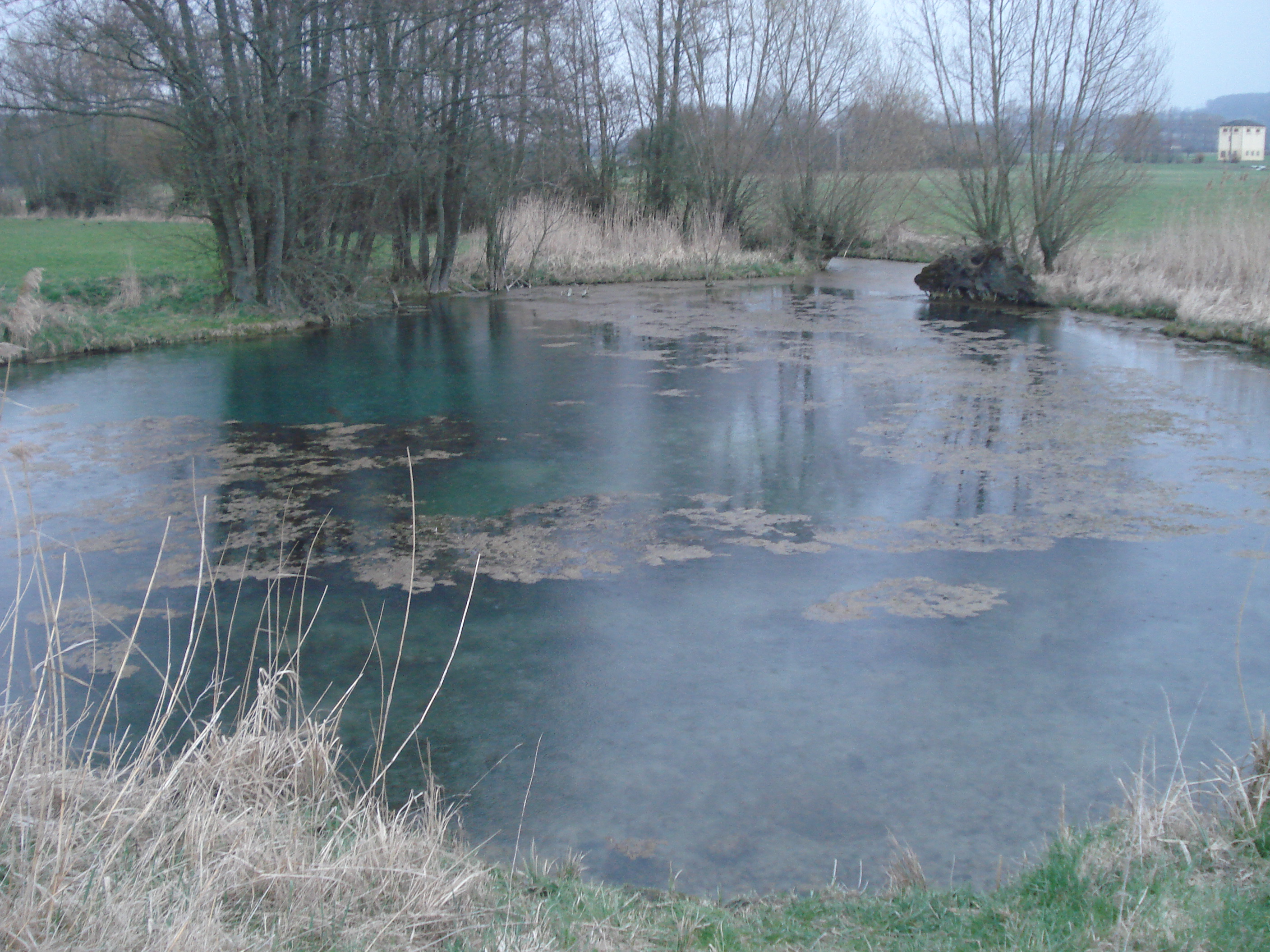 Das Bodenlose Loch ist eine Karstquelle bei Diebach auf der Frankenhöhe in Bayern.